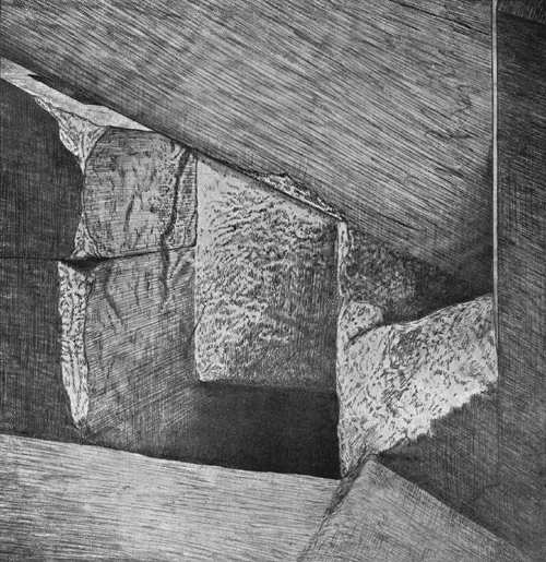 embranchement de la grande galerie dans la pyramide de Khéops